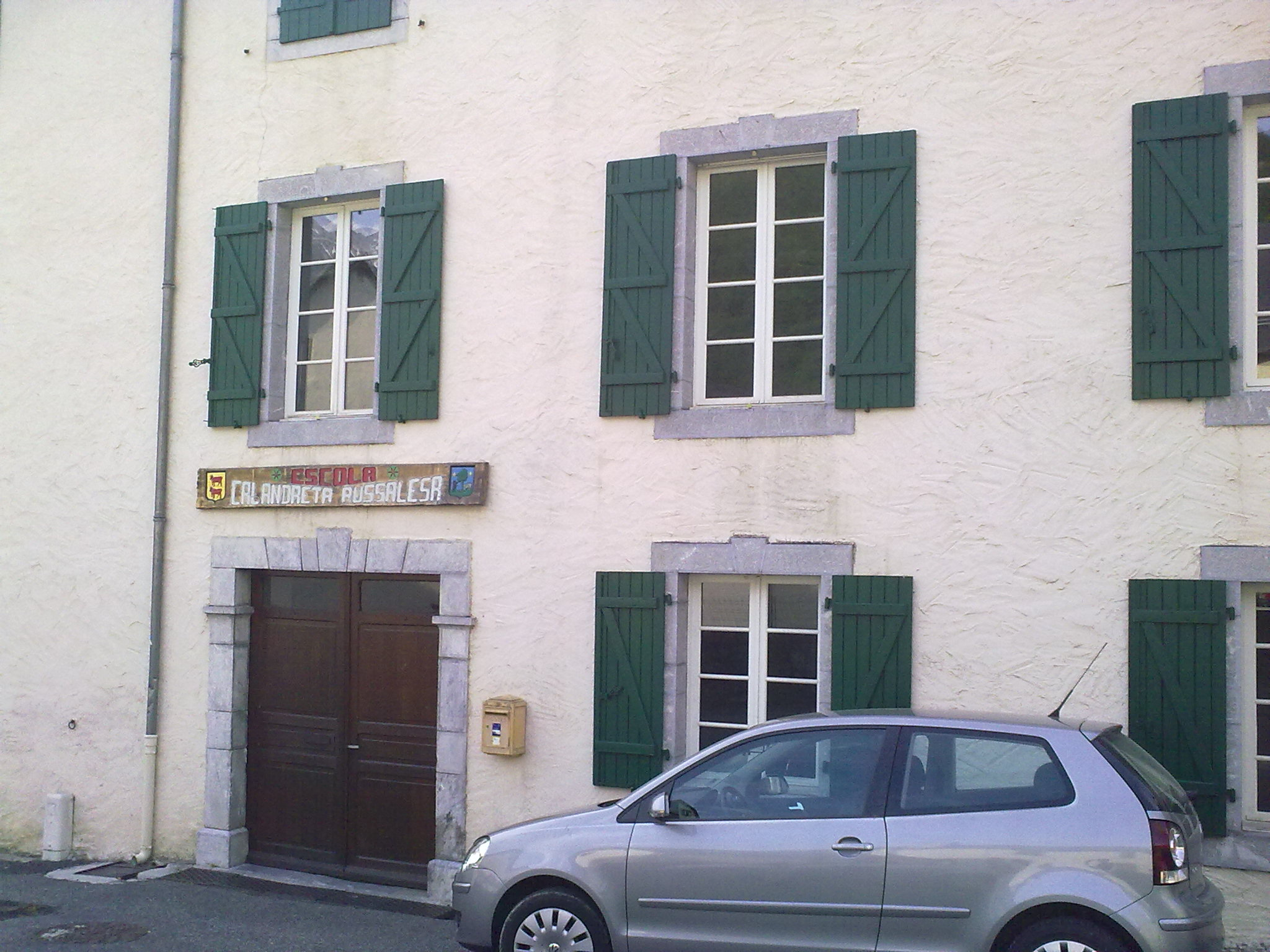 Ecole Calandreta de Béost.